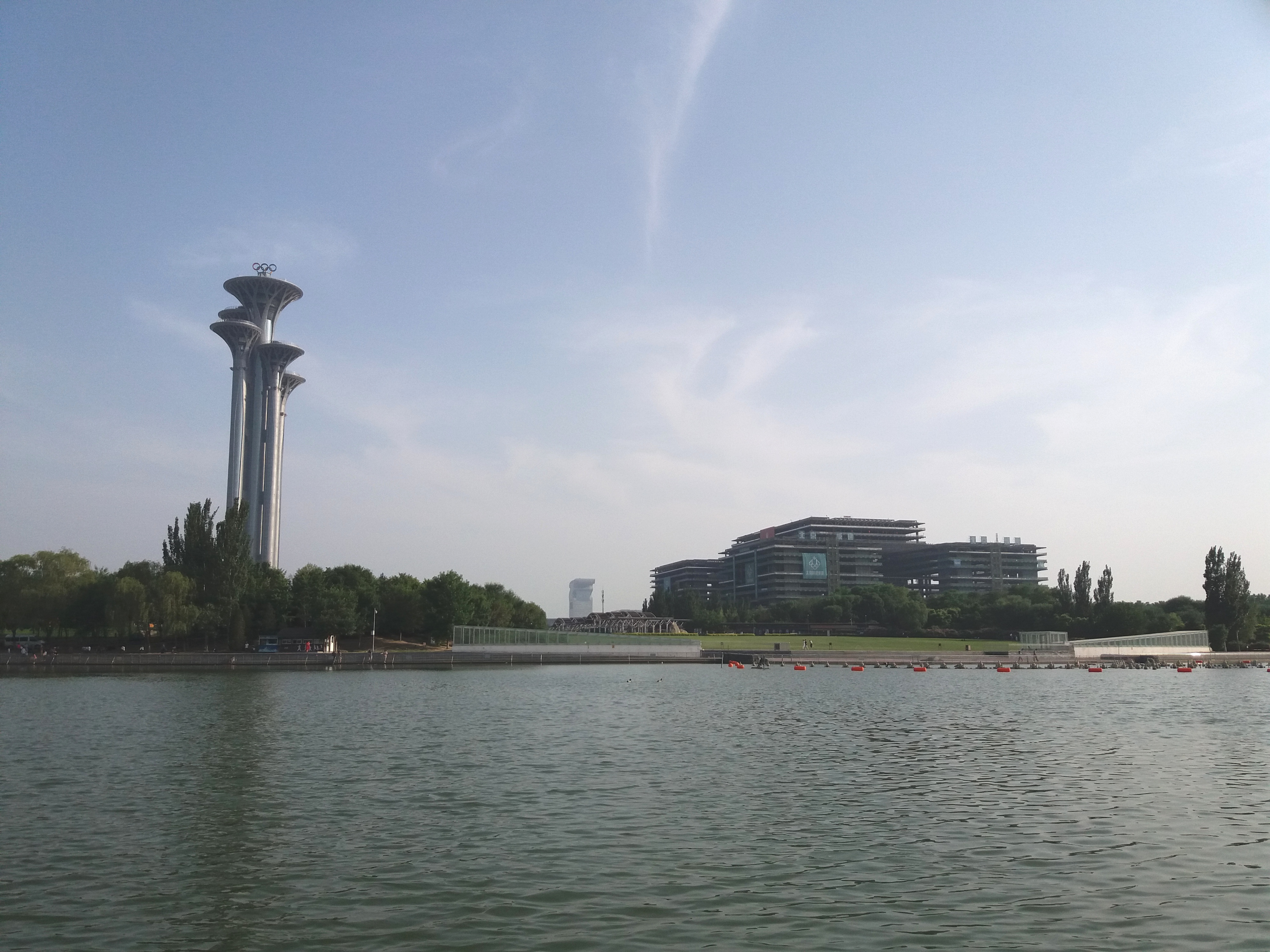 Olympic Forest Park